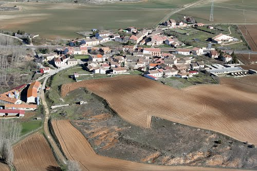 Aldealcorvo desde el aire